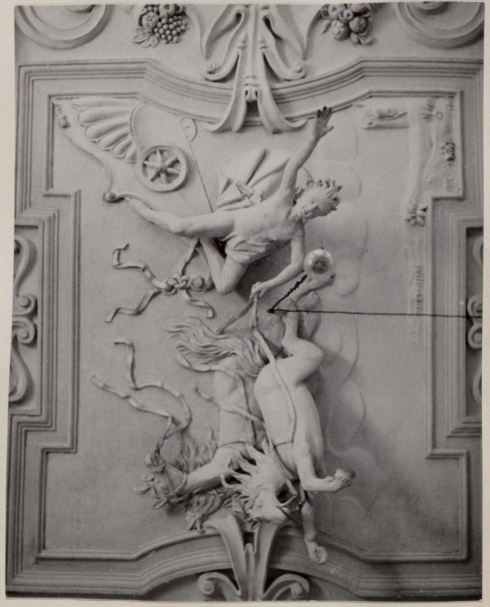 Plafonddecoratie in stucwerk in het voormalige ambachtshuis van de brouwers, Onderbergen 36-38 (hoek Zwartezustersstraat), Gent. Mythologisch tafereel: de zonnewagen van Helios, gemend door zijn zoon Phaëton. Werk van beeldhouwer Jan Hansche, 1673.